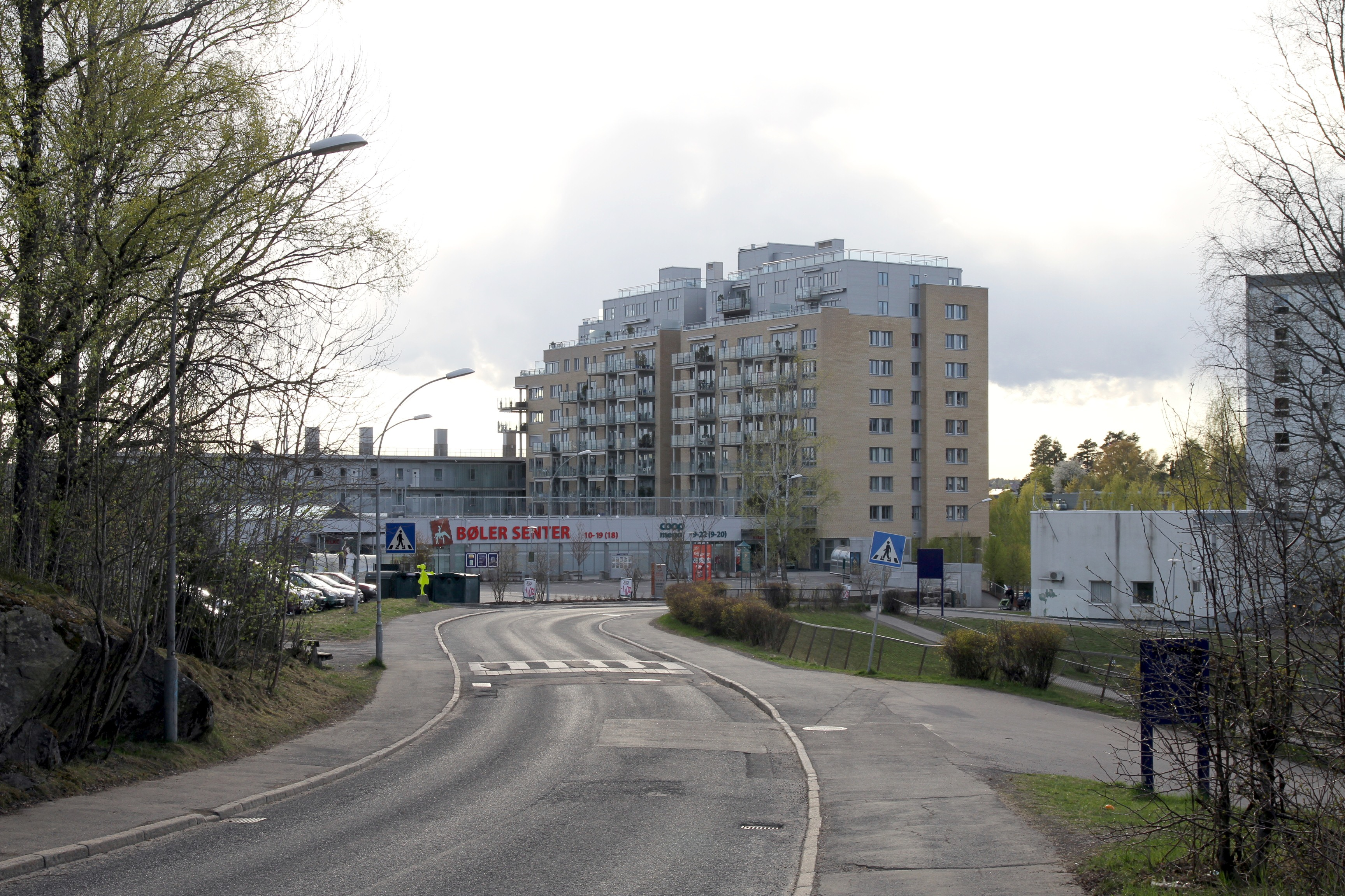 Utmarkveien på Bøler i Oslo.